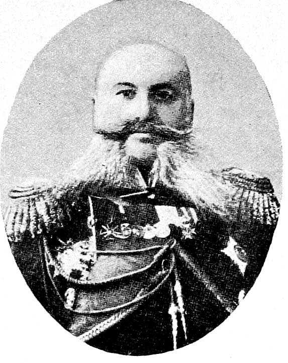 Это изображение было использовано для иллюстрирования статьи «Клейгельс, Николай Васильевич» опубликованной в двенадцатом томе «Военной энциклопедии», который был издан книгоиздательским товариществом И. Д. Сытина в 1913 году в столице Российской империи городе Санкт-Петербурге. Более подробное описание к этой картинке можно прочесть в указанной выше статье.